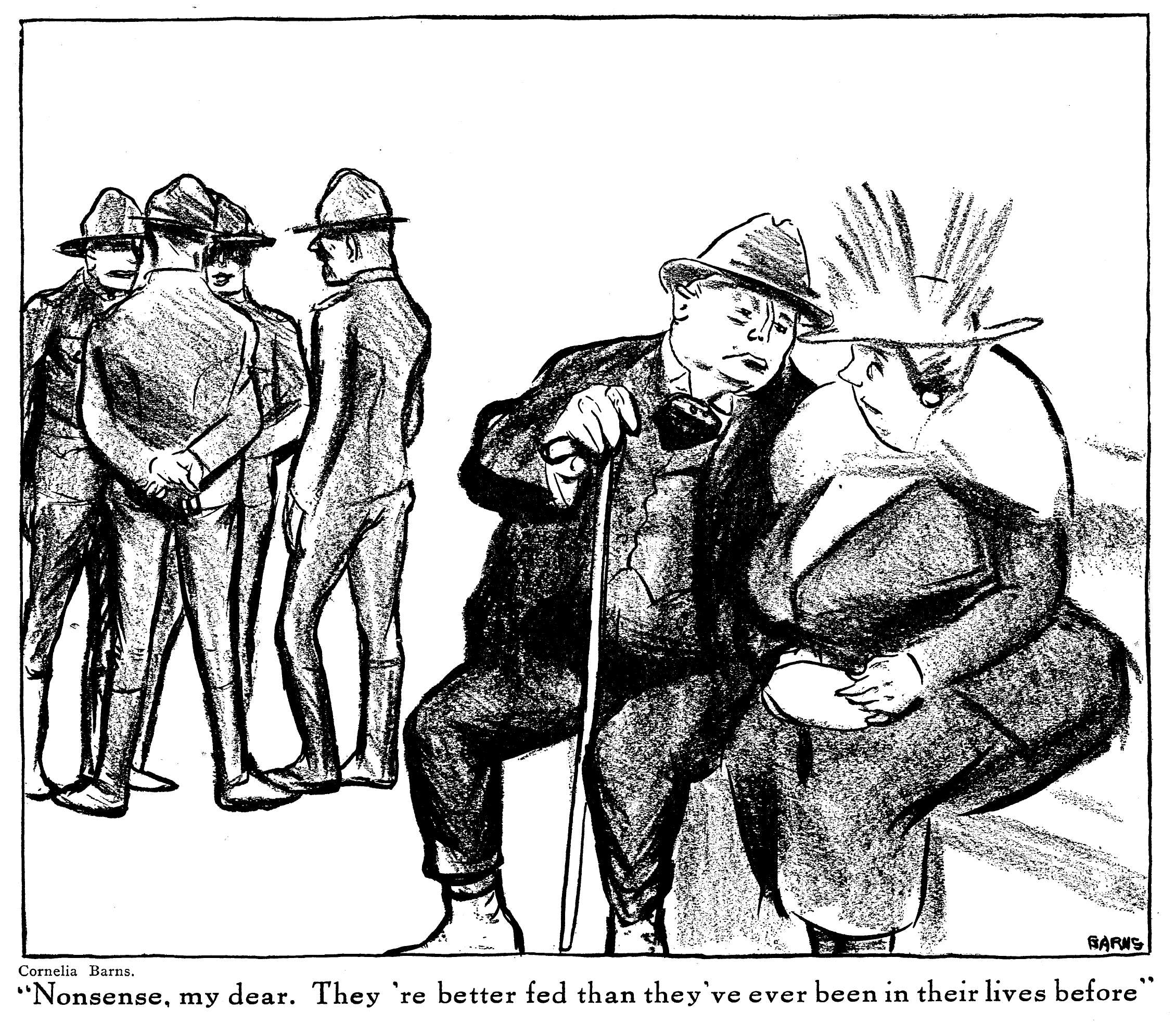 «Nonsense, my dear, they're better fed than they've ever been in their lives before», agosto de 1918, The Liberator.